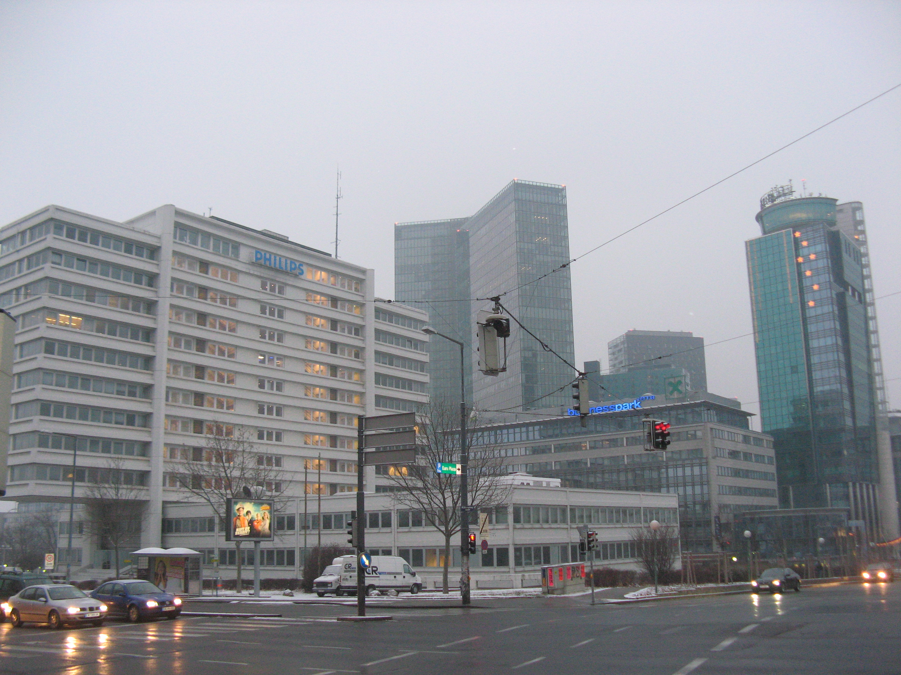 Philips-Haus und Business-Park Vienna, Wienerbergstraße, Wien-Favoriten (More images, commons, de)